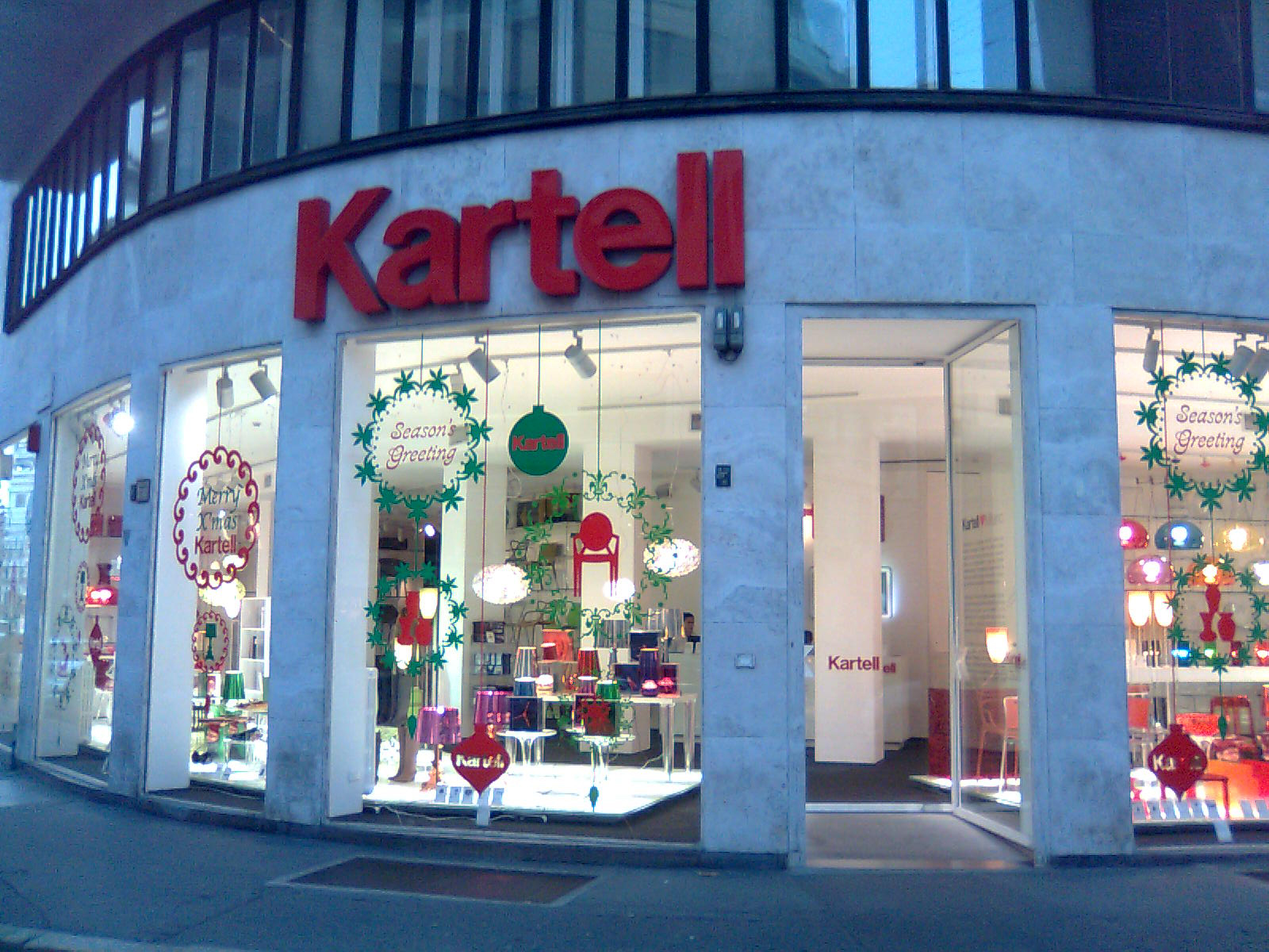 Negozio Kartell in Via Turati a Milano